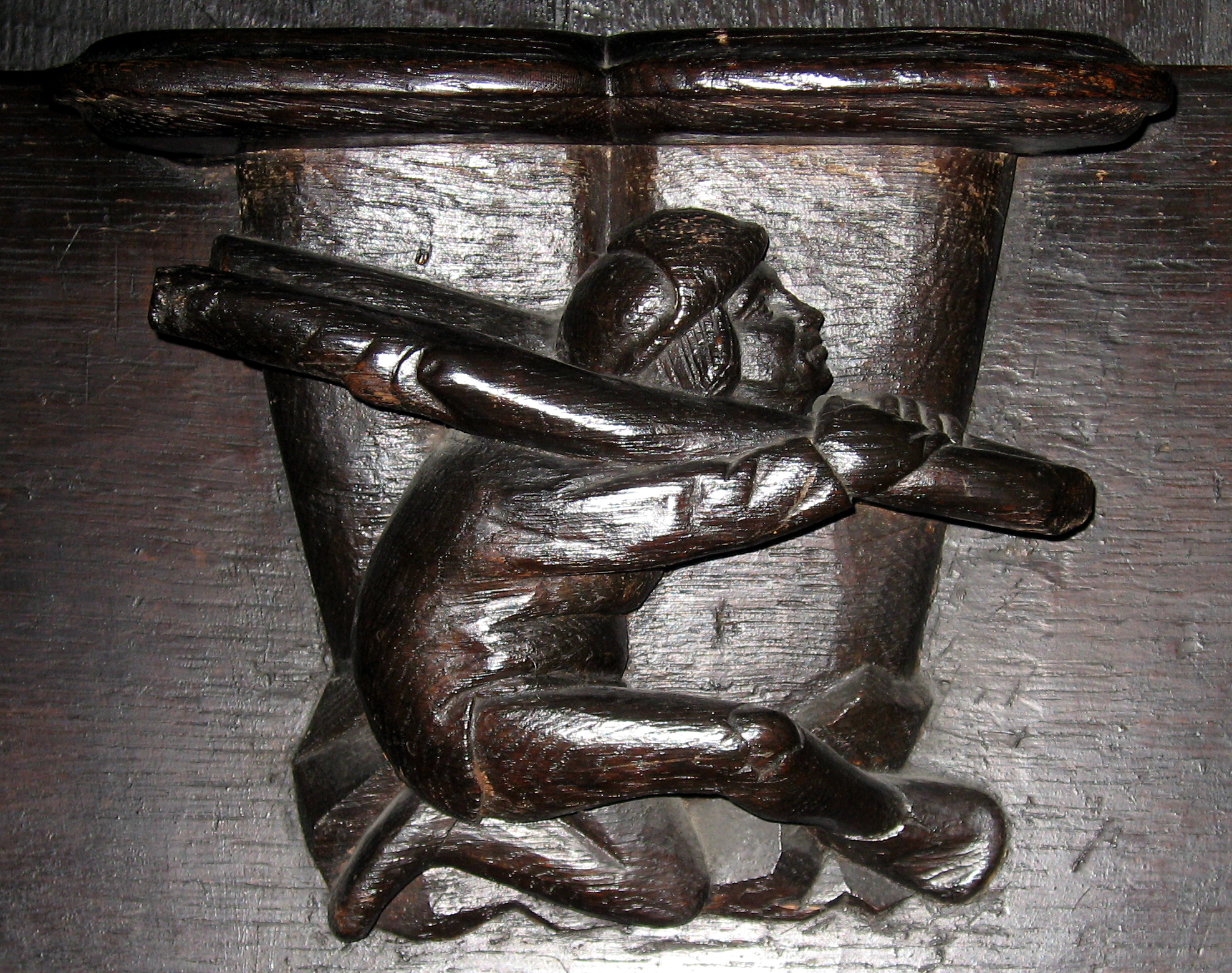 Marienkirche Dortmund, Cappenberger Chorgestühl (~1520), Miserikordien mit symbolischer Darstellung des Ehebrechers in der Gabel des Schandprangers